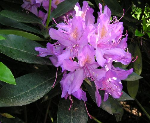 Rhododindron localisation : Quaregnon - hainaut - Belgique date : 2004:06:05 15:08:06 photographe : Moosh 13 jun 2004 à 10:33 (CEST)